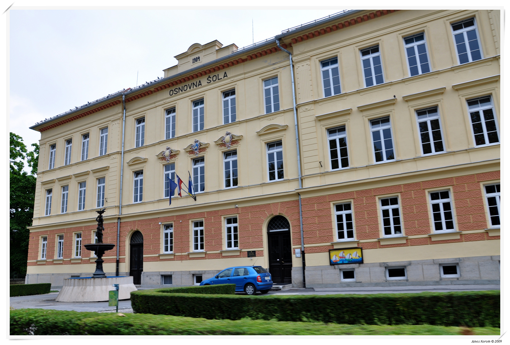 Vrhnika (12)